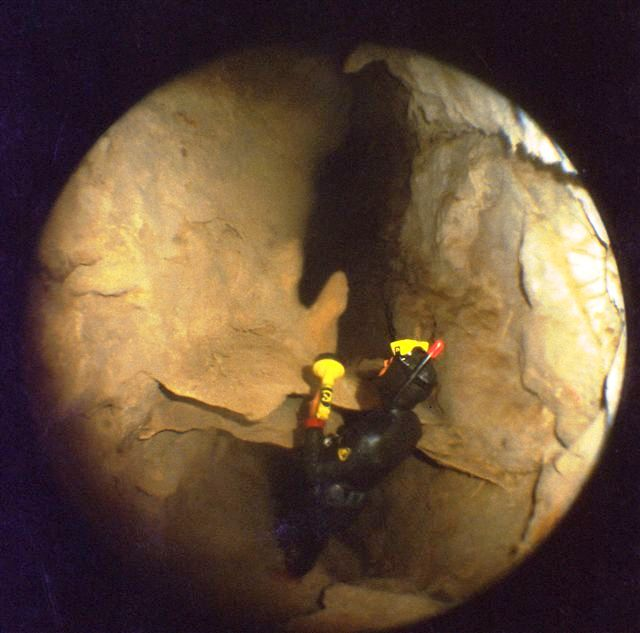 Area Marina Protetta Capo Gallo, Palermo, Sicily Grotta della Màzzara